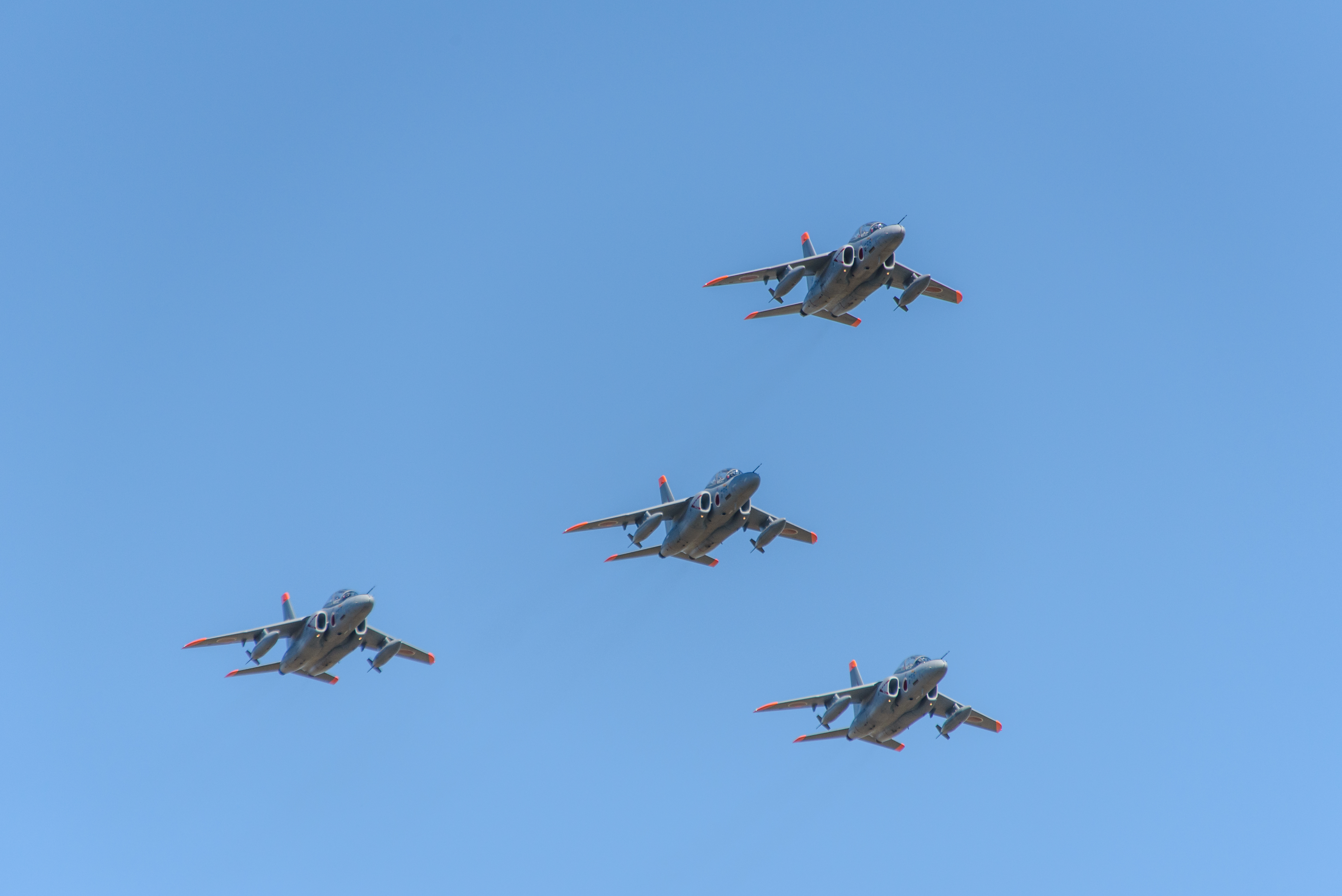 DSC_6999 Iruma Air Base Festival 2015